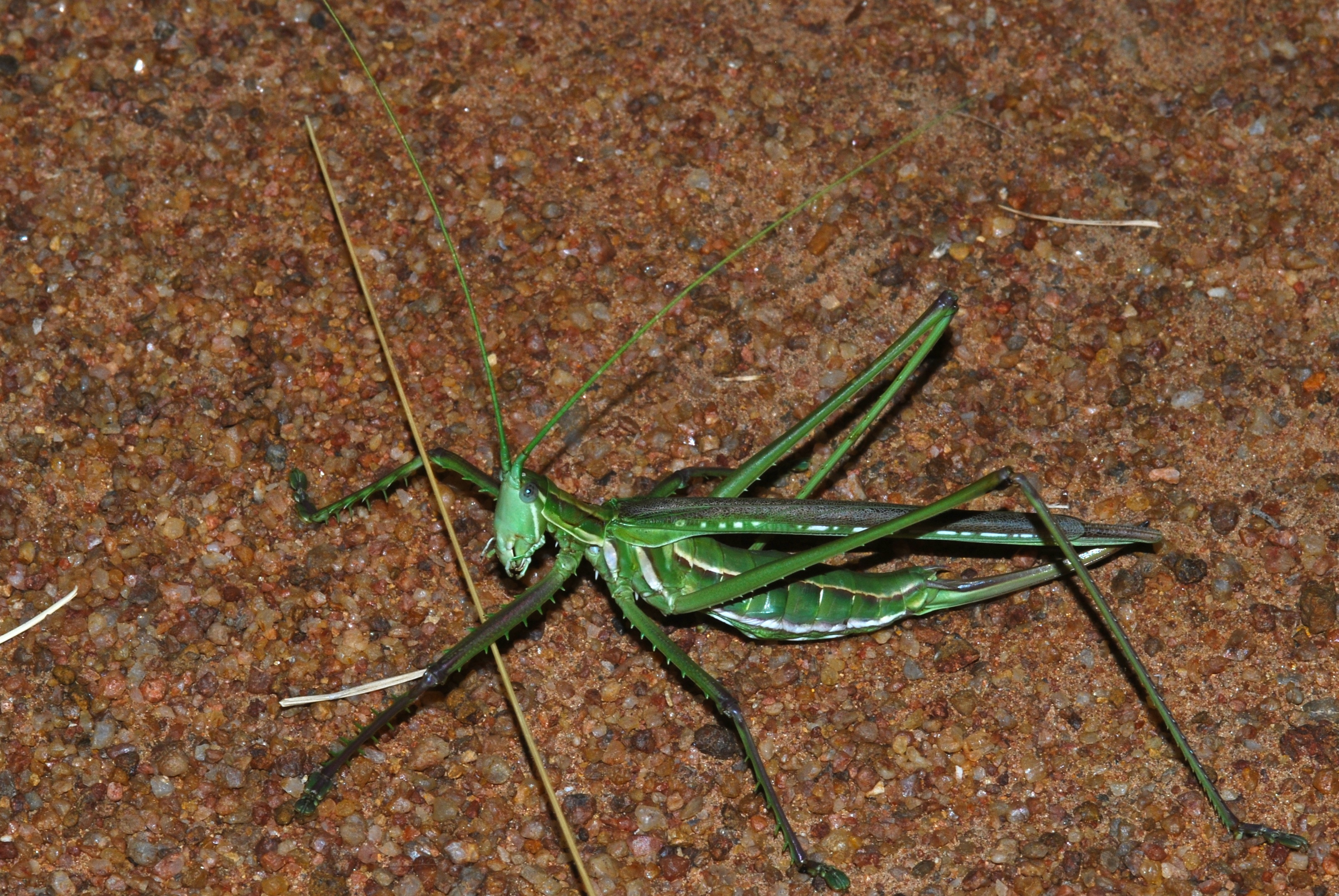 Manyane Resort Walking Trail, Pilanesberg, SOUTH AFRICA